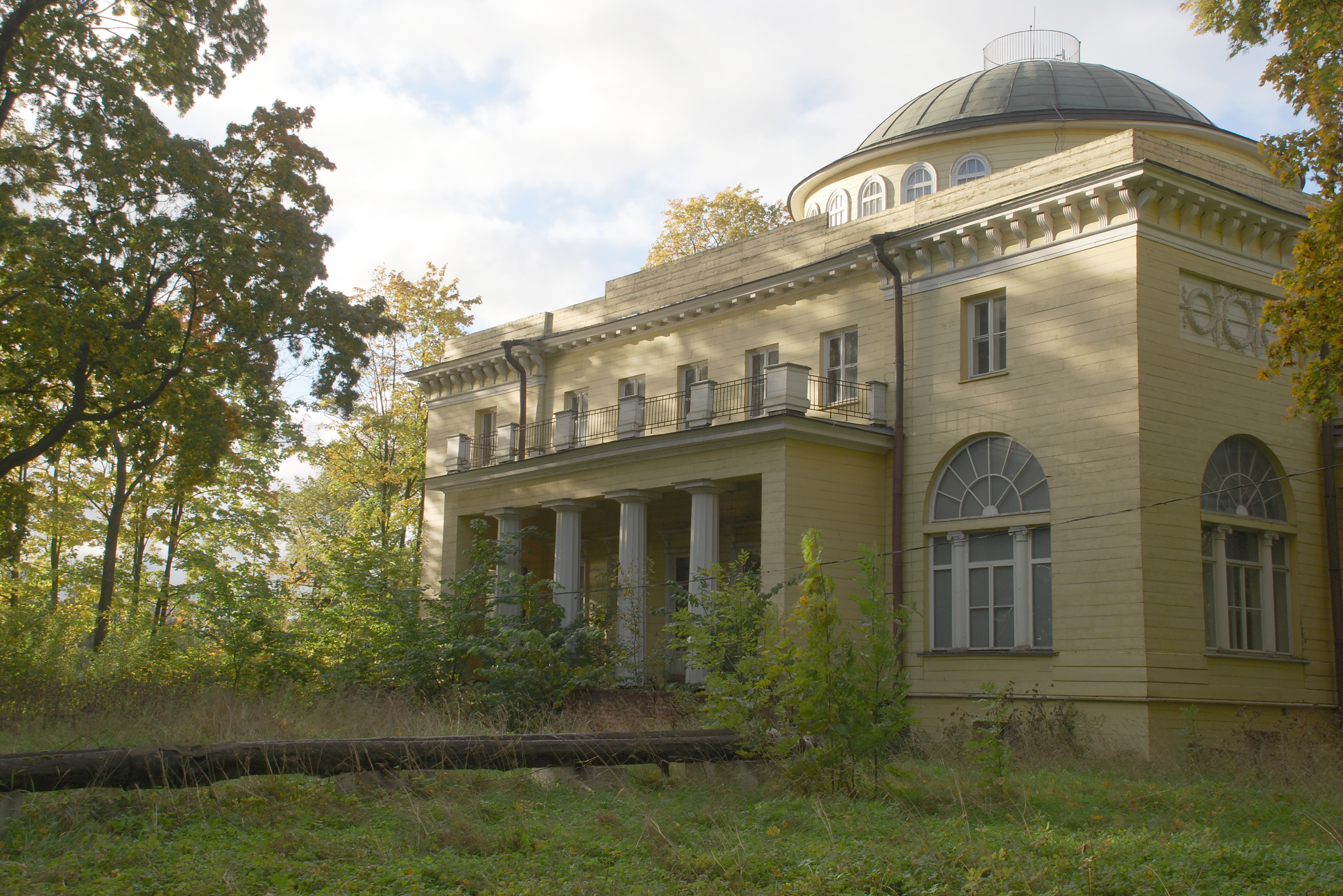 Дача Долгорукова В. В.(принца Ольденбургского П. Г.) в Петербурге, вид из сада